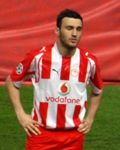 Vasilis Torosidis, Chelsea (3) v (0) Olympiakos